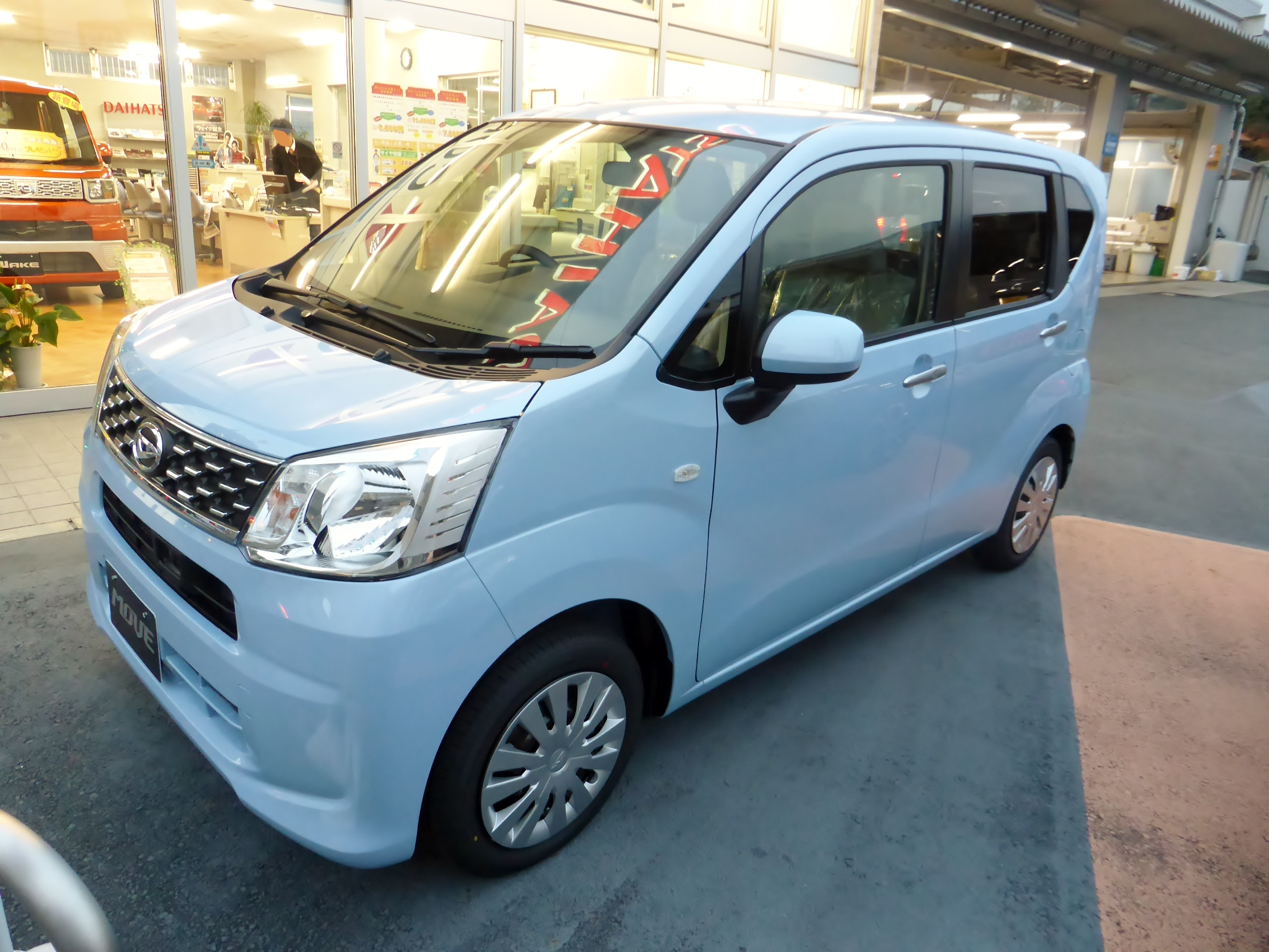 LA150S型ダイハツ・ムーヴL"SA"をフロントから撮影。